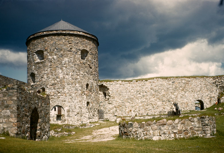 Kungälvs gamla stad-Bohus Fästning. En av Nordens mest välbevarade trästäder med bebyggelse från 1700- och 1800-tal. Staden ligger invid gränsfästet Bohus, med anor från tidigt 1300-tal och uppförd i ett strategiskt läge vid Nordre Älv. Hit flyttade efter 1612 staden Kungahällas innebyggare och en ny stad uppfördes på fästningsholmen. Platsen övergavs till förmån för läget av dagens Kungälv, som uppstod i slutet av 1600-talet. Motiv: Bohus fästning Nyckelord: Riksintressen Kategori: Fästning Kungälvs gamla stad-Bohus Fästning. En av Nordens mest välbevarade trästäder med bebyggelse från 1700- och 1800-tal. Staden ligger invid gränsfästet Bohus, med anor från tidigt 1300-tal och uppförd i ett strategiskt läge vid Nordre Älv. Hit flyttade efter 1612 staden Kungahällas innebyggare och en ny stad uppfördes på fästningsholmen. Platsen övergavs till förmån för läget av dagens Kungälv, som uppstod i slutet av 1600-talet.